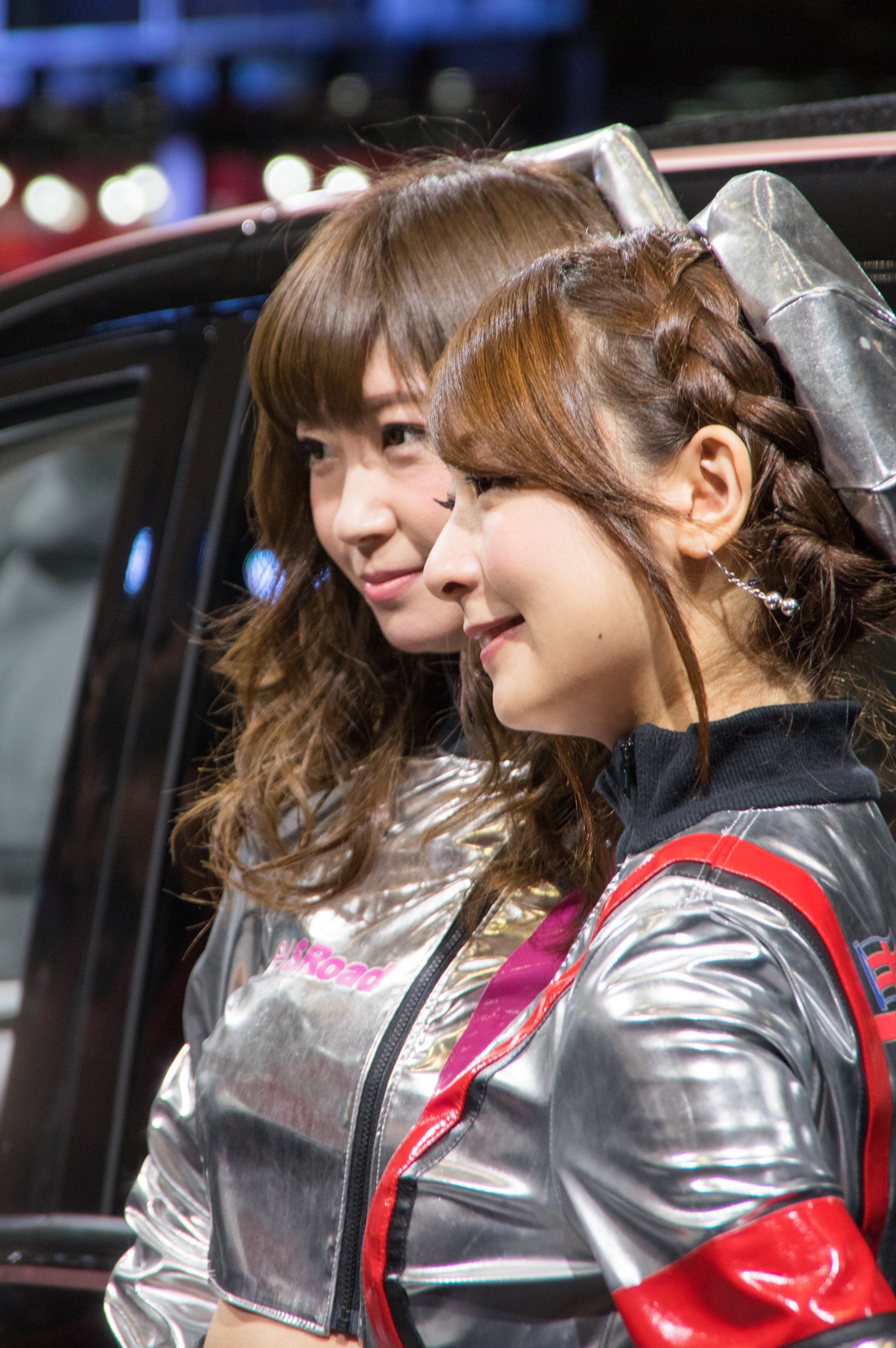 TOKYO AUTO SALON 2017 （東京オートサロン2017）-119.jpg